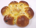 Dreikönigskuchen